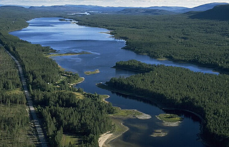 Ortholmen. Motiv: Orten Nyckelord: Flygbilder, Riksintressen Kategori: Insjömiljöer, SkogslandskapOrtholmen.